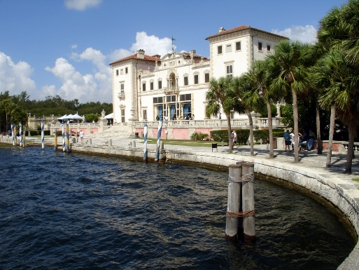 Vista de Vizcaya, Miami, Flórida, EUA.